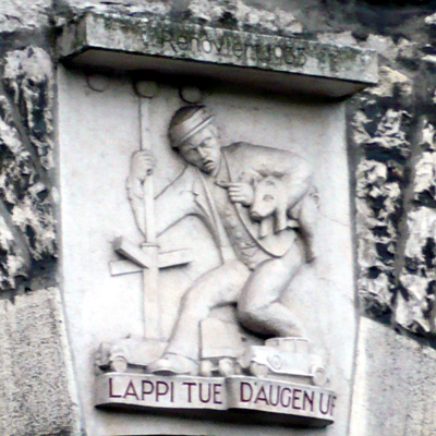 Schaffhausen: Schwabentorturm „LAPPI TUE D’AUGEN UF“(Hochdeutsch: Dummkopf, öffne die Augen)